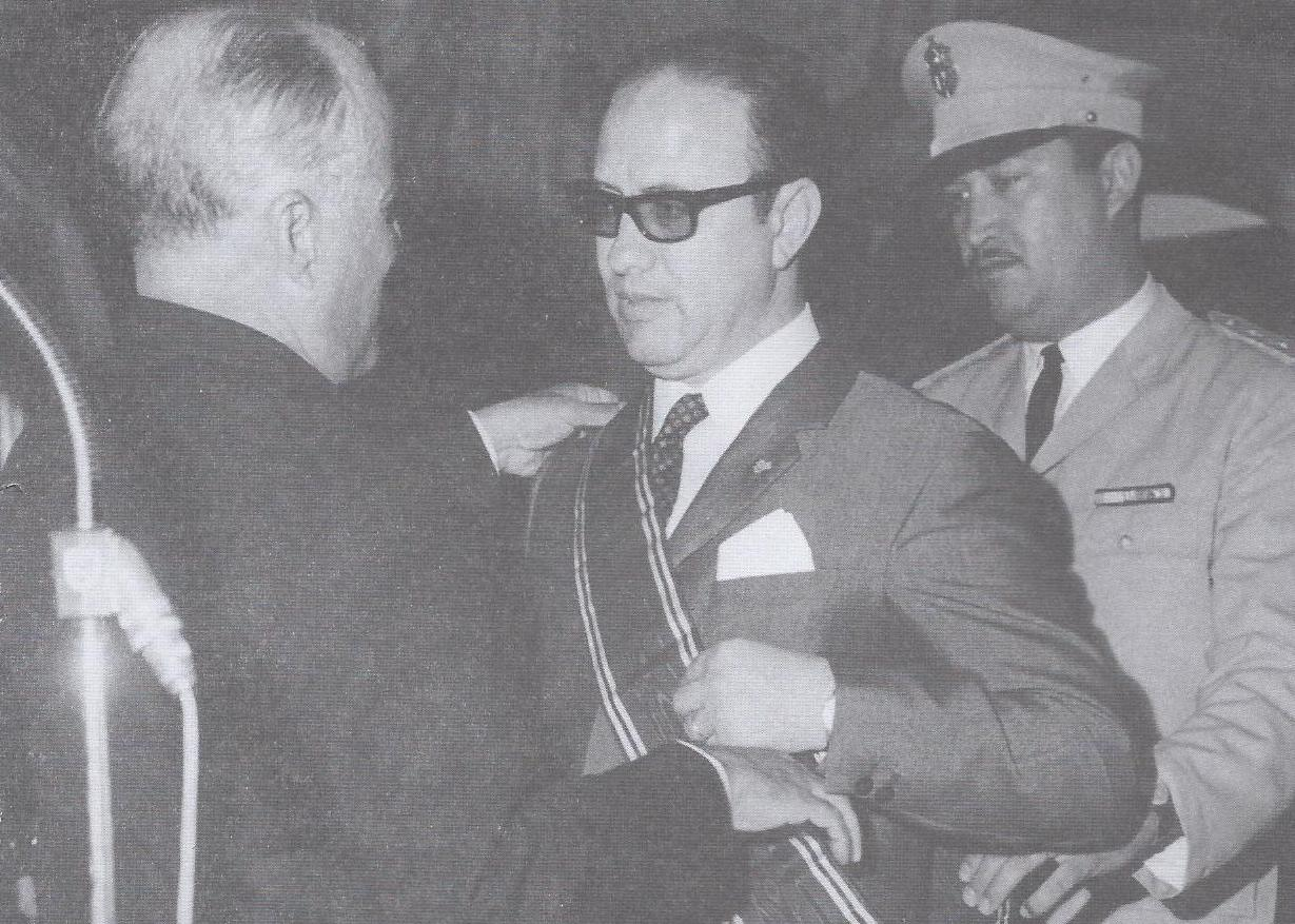 Habib Bourguiba décore Béji Caïd Essebsi ministre de l'intérieur du grand cordon de l'indépendance, le 1er juin 1966.